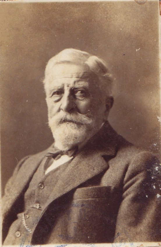 Michele Trefogli Arquitecture,Retrato de Michele Trefogli(1927)